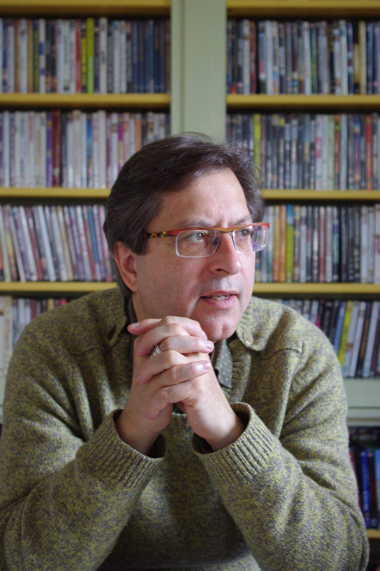 Portrait Laurent Cuniot 2013